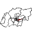 Mapa del distrito de Characato, Arequipa